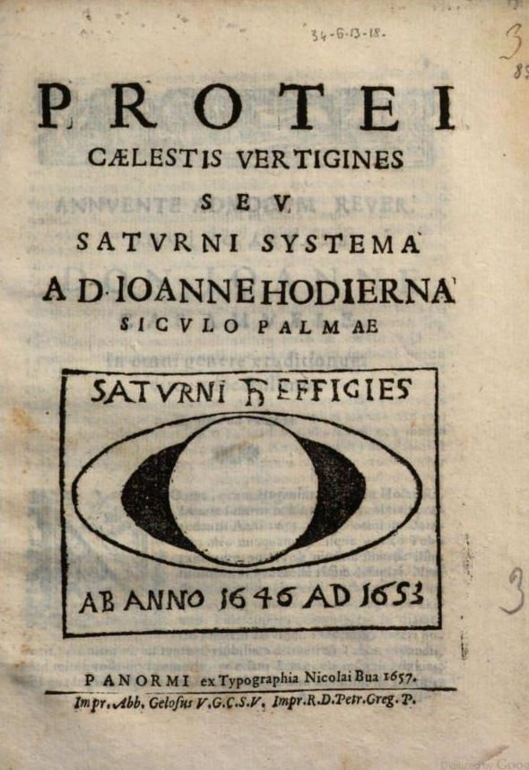 Hodierna Protei caelestis vertigines 1657 title page